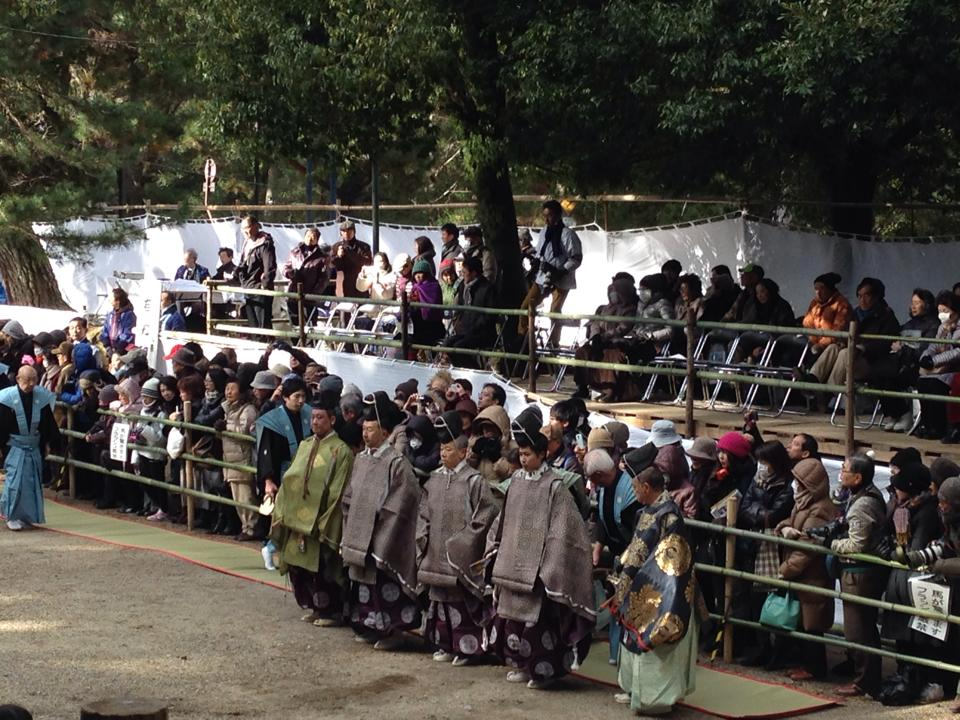 お渡り式行列の猿楽座。影向の松前。